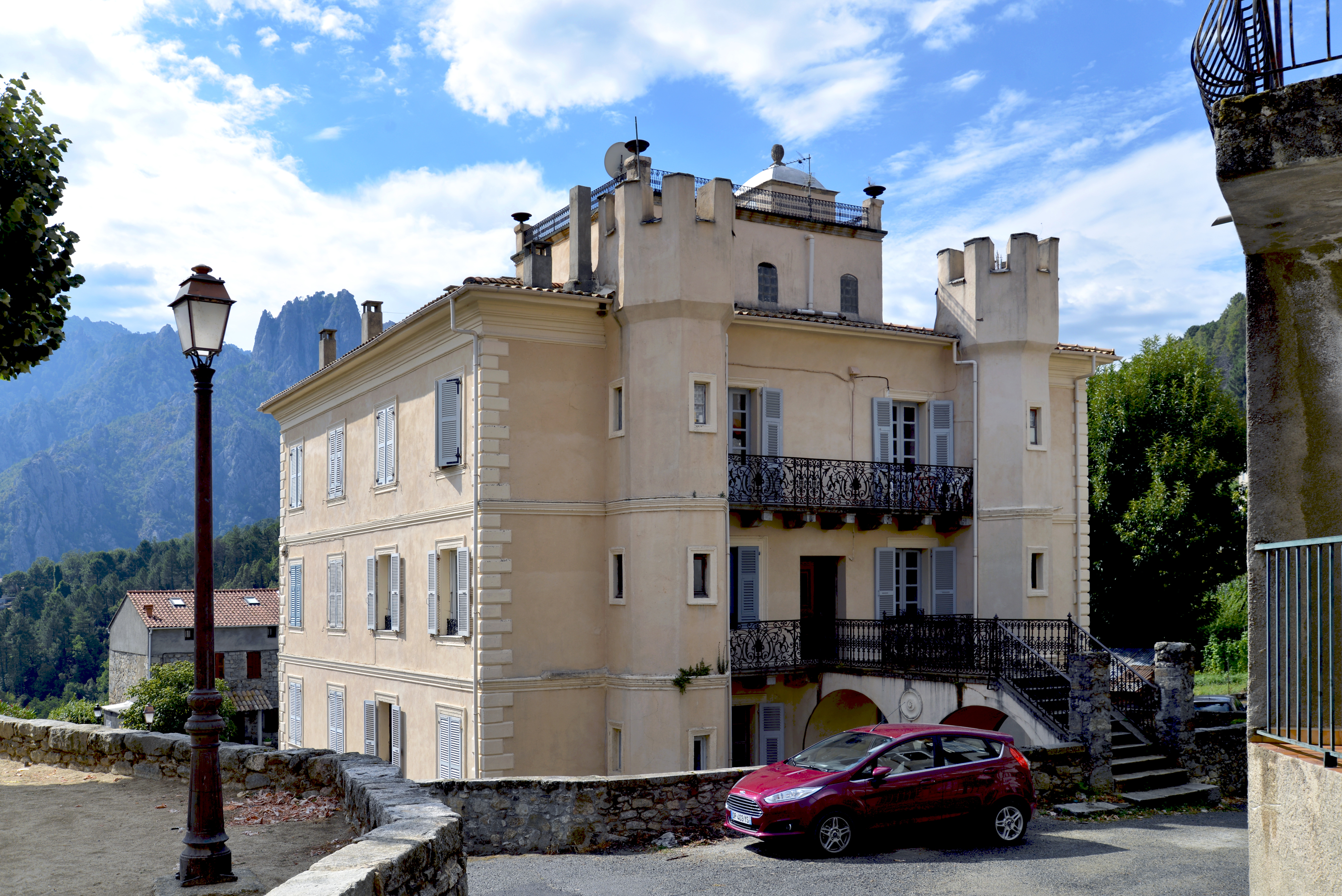 Ghisoni, Fiumorbo (Corse) - Maison en bordure de la place Seratu, au centre du village.